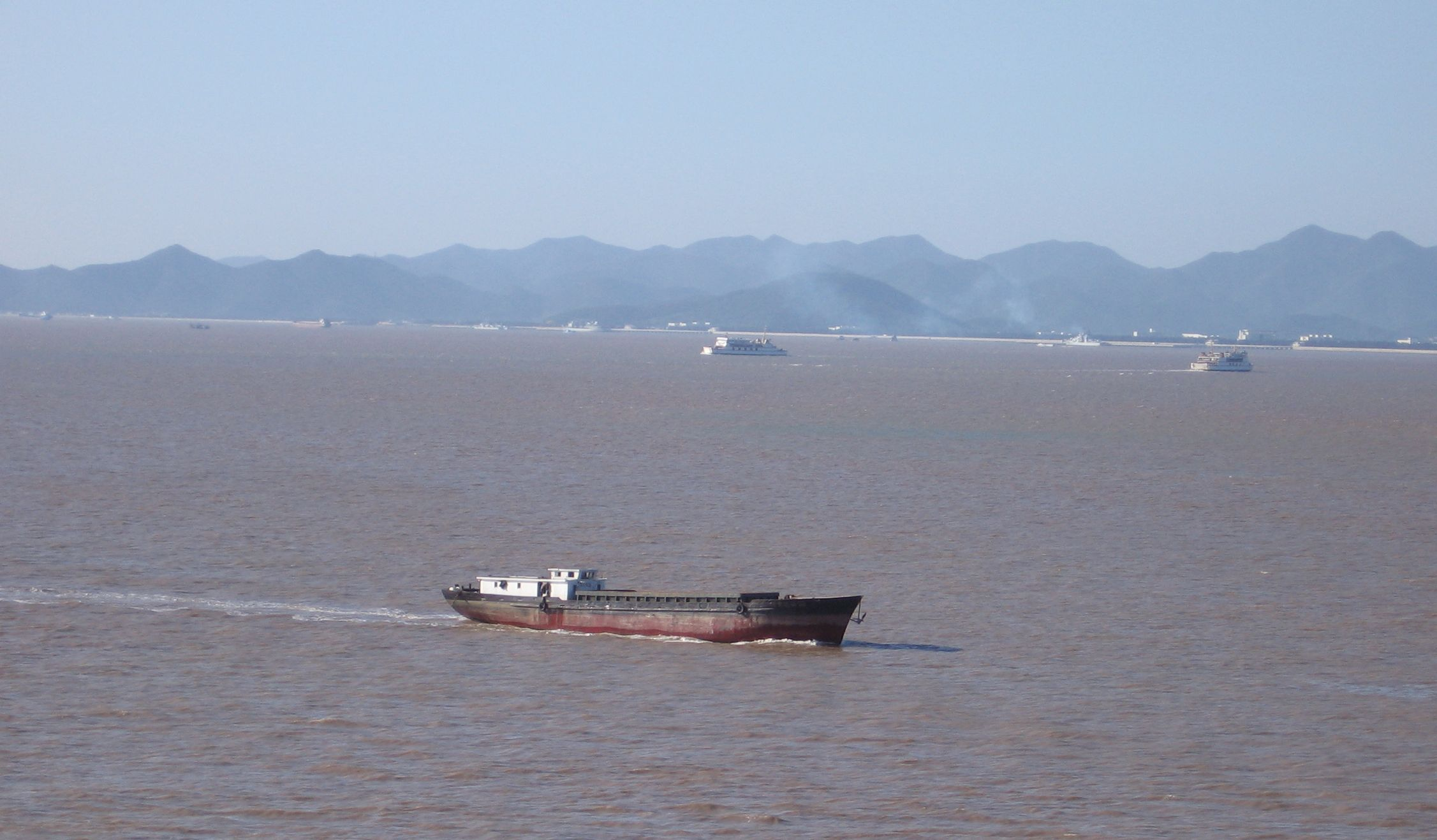 Port of Ningbo, China